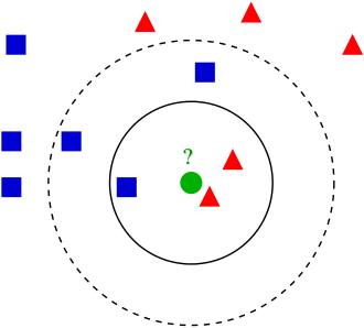 แผนภาพอธิบายการจัดกลุ่มข้อมูลของขั้นตอนวิธีการเพื่อนบ้านใกล้ที่สุด